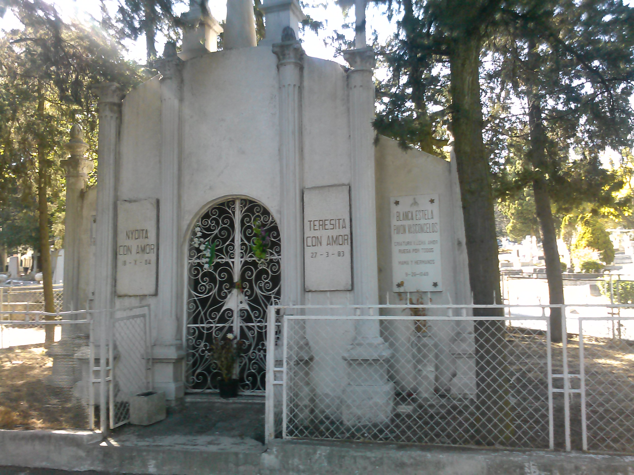 Foto tomada en el panteón jardín de la tumba de Blanca Estela Pavon